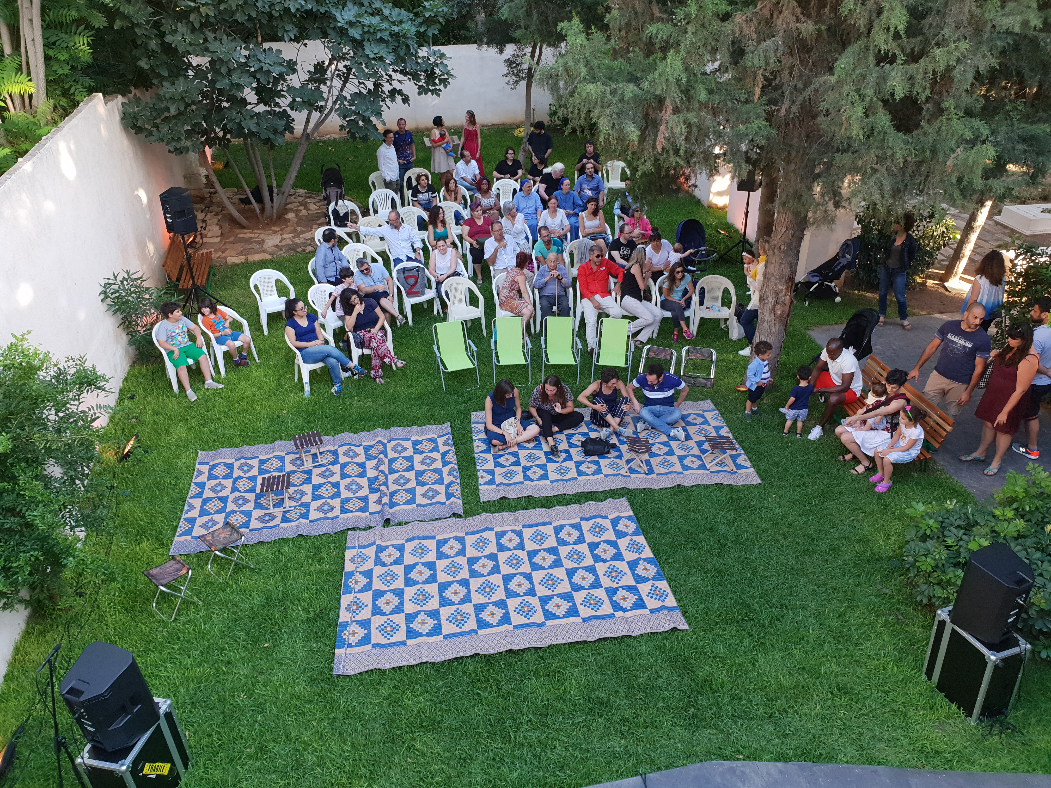 Première rencontre culturelle au Cimetière Protestant Français de Beyrouth le 17/06/2018.